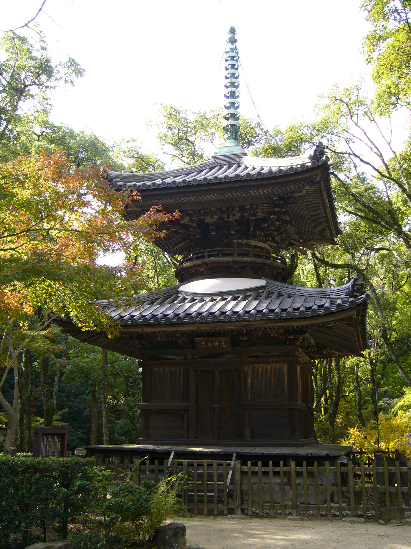 Tokko-in in Kobe, Hyogo, Japan